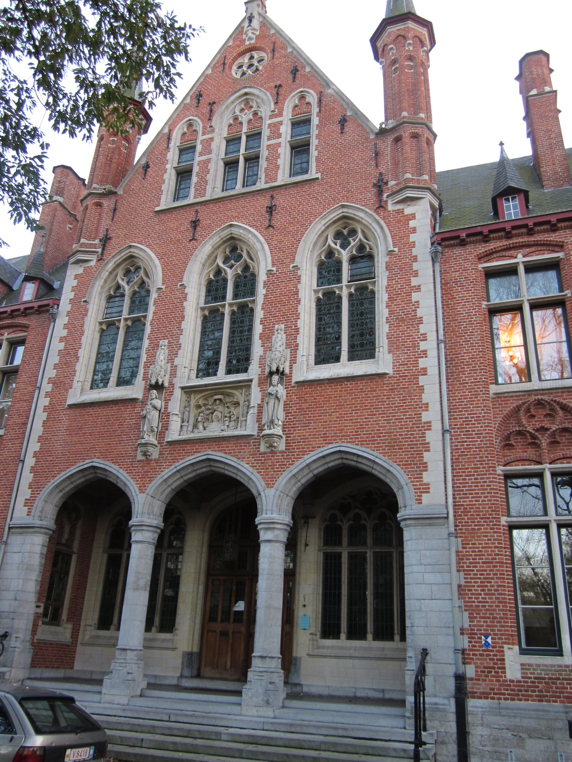 Ingang Minnewaterkliniek, Prof.Dr.J.Sebrechtsstraat Brugge, tegenwoordig woon-en verzorgingscentrum. 31″ N, 3° 13′ 18.44″ E